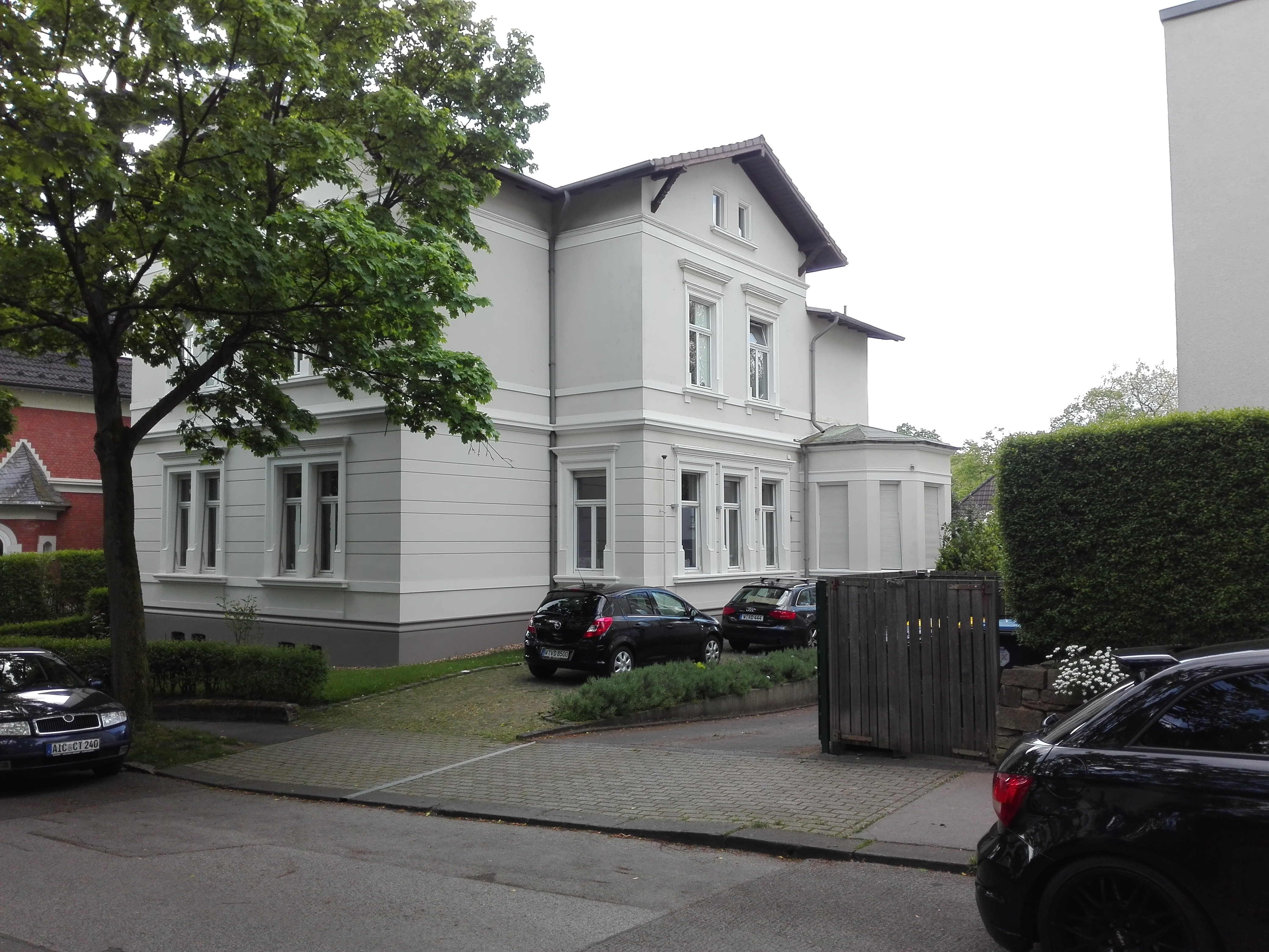 Wohnhaus Jaegerstraße 11 im Wuppertaler Zooviertel, beherbergte bis 2007 die Maximilian-Kolbe-Kapelle